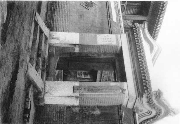 北京吕祖宫山门